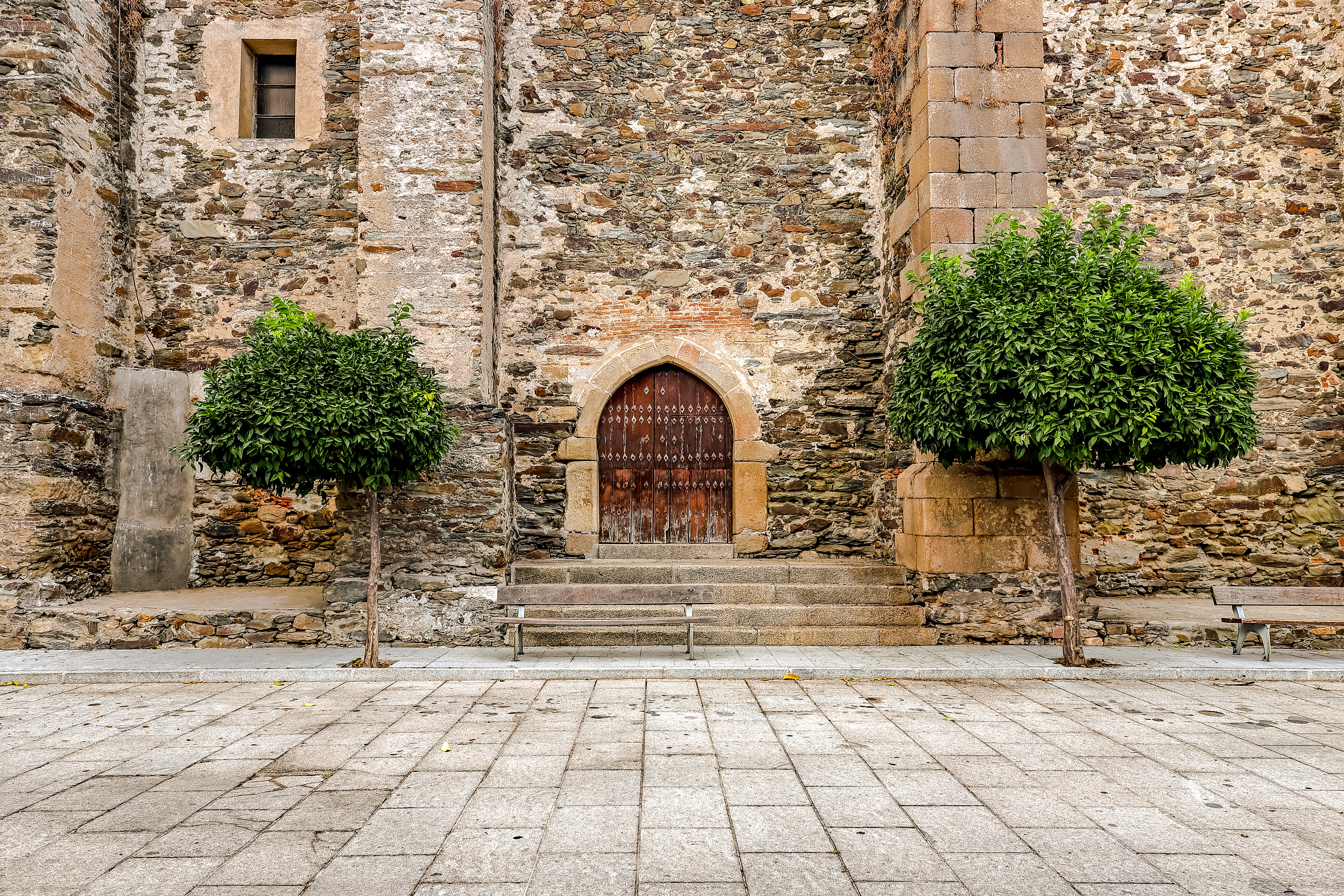 Casillas de Coria es un municipio de la mancomunidad de Rivera de Fresnedosa en la provincia de Cáceres.